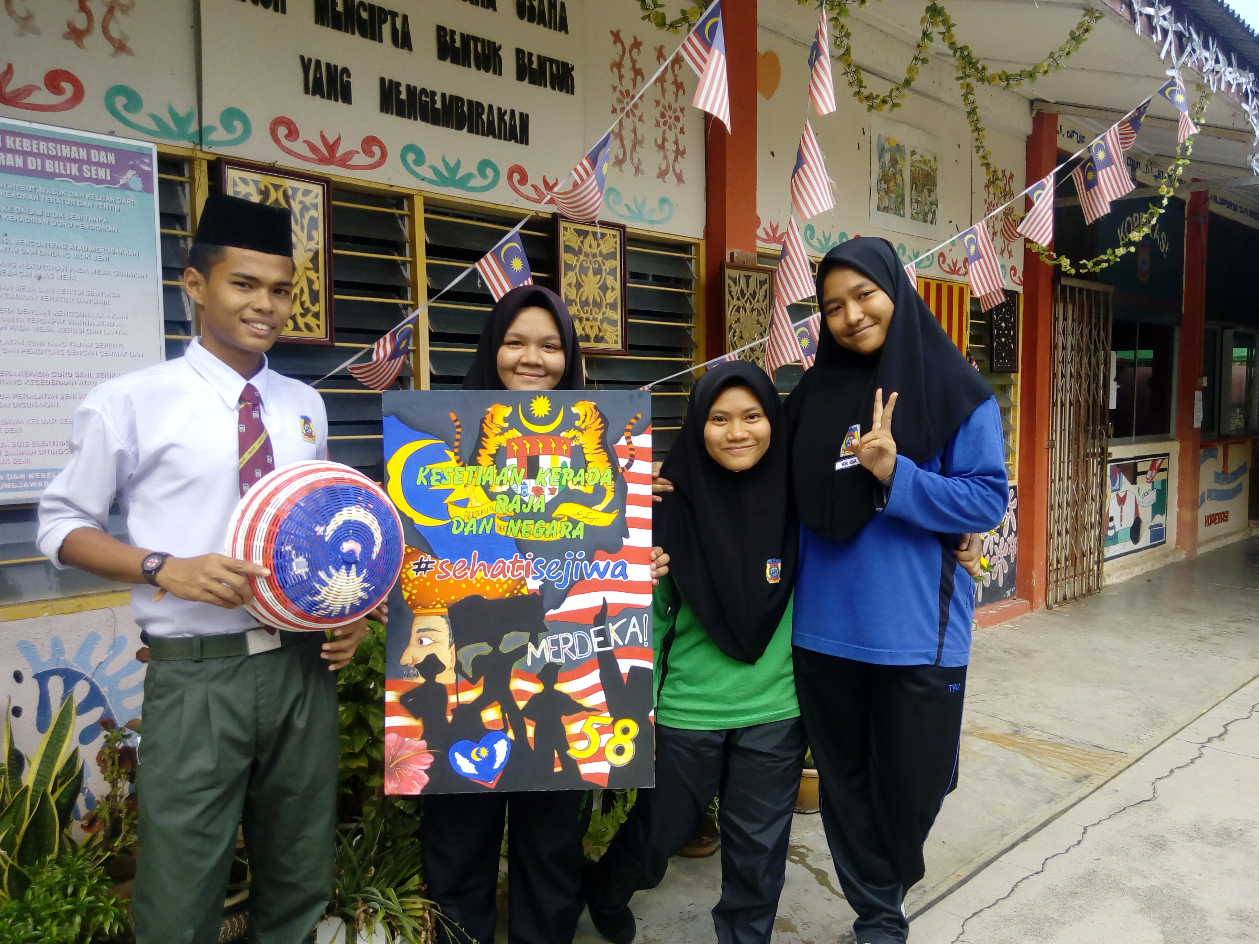 Pertandingan poskad kemerdekaan